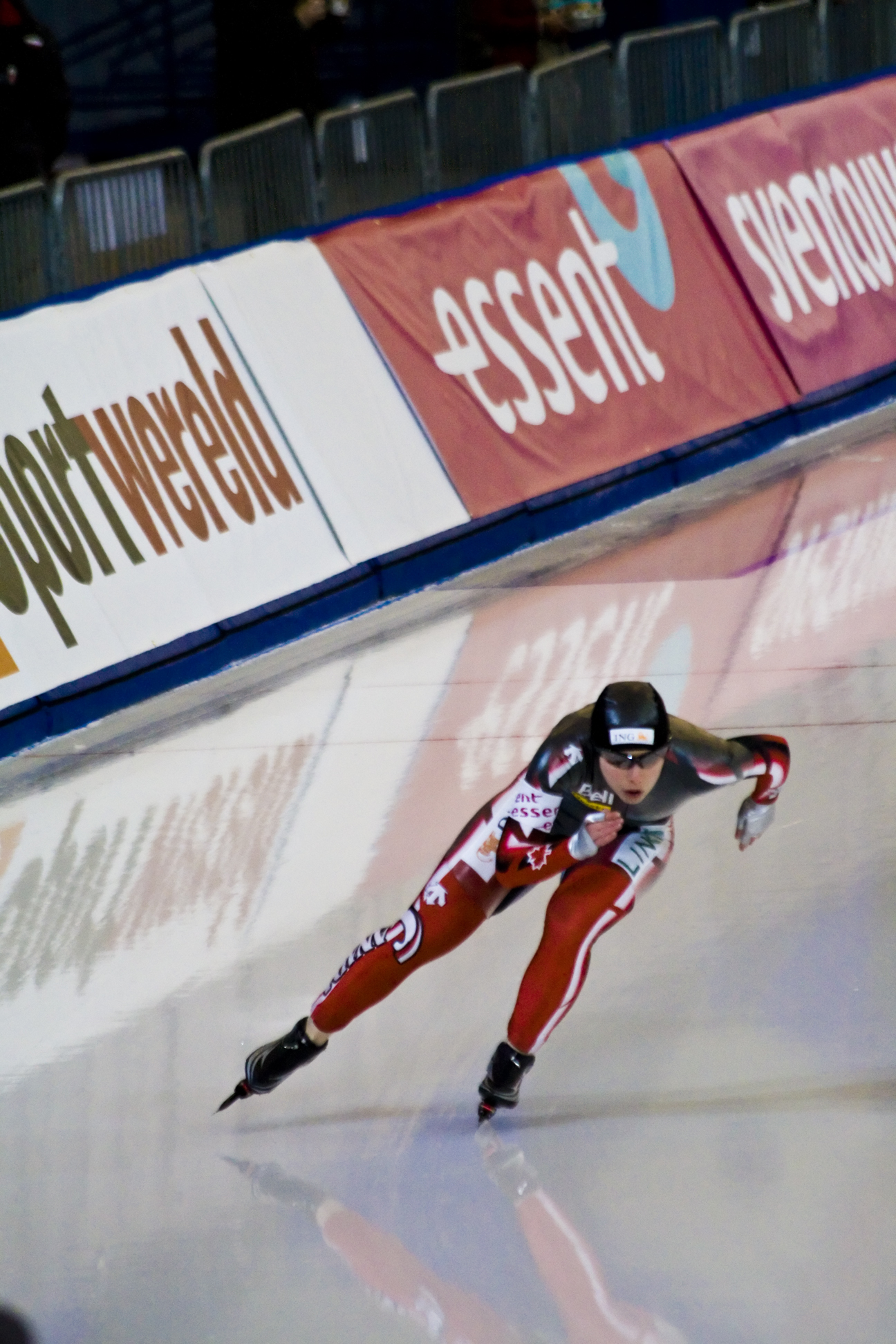 Kim Weger, Canada